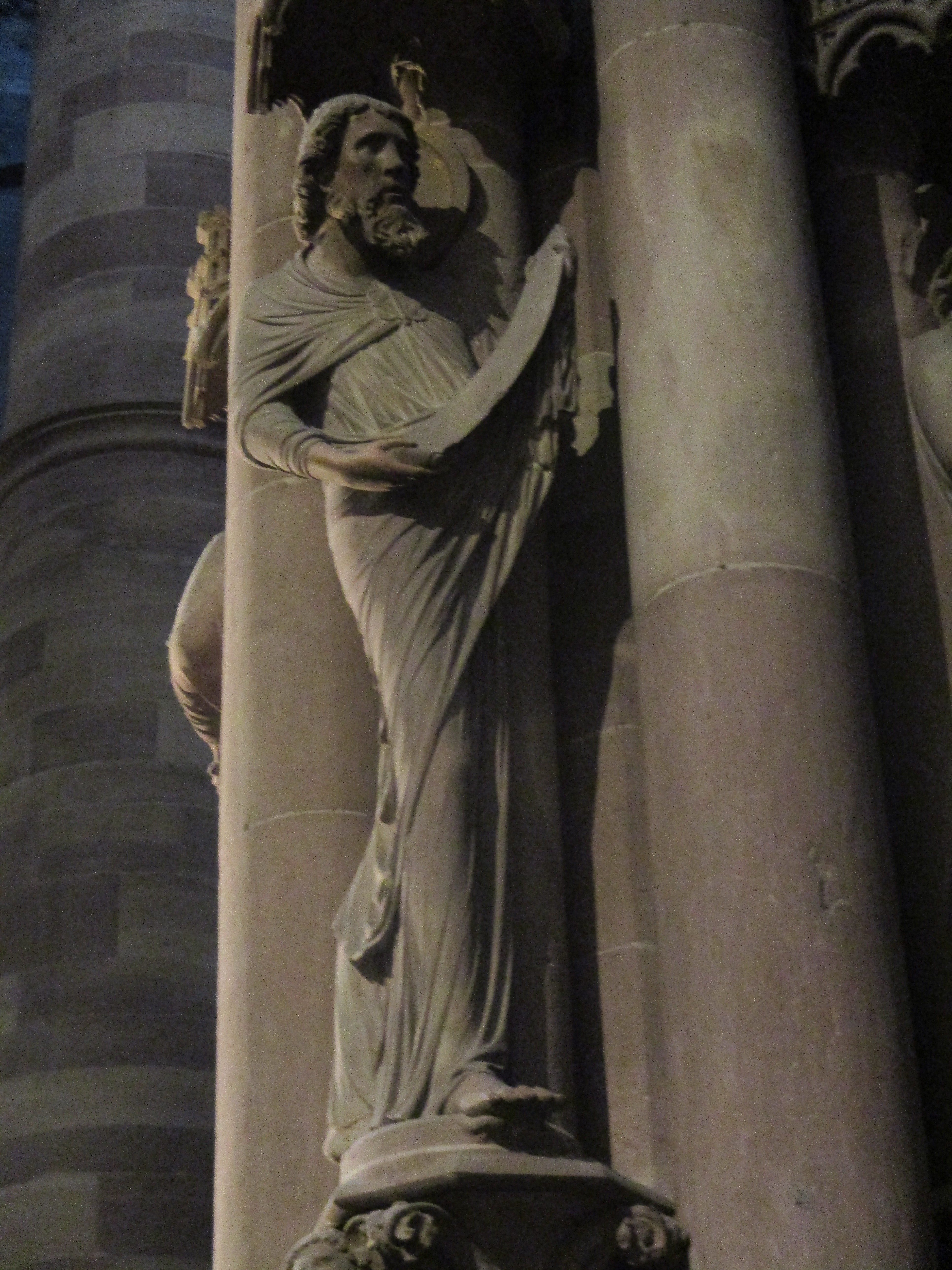 Saint Matthieu, détail du Pilier des Anges de la cathédrale de Strasbourg.